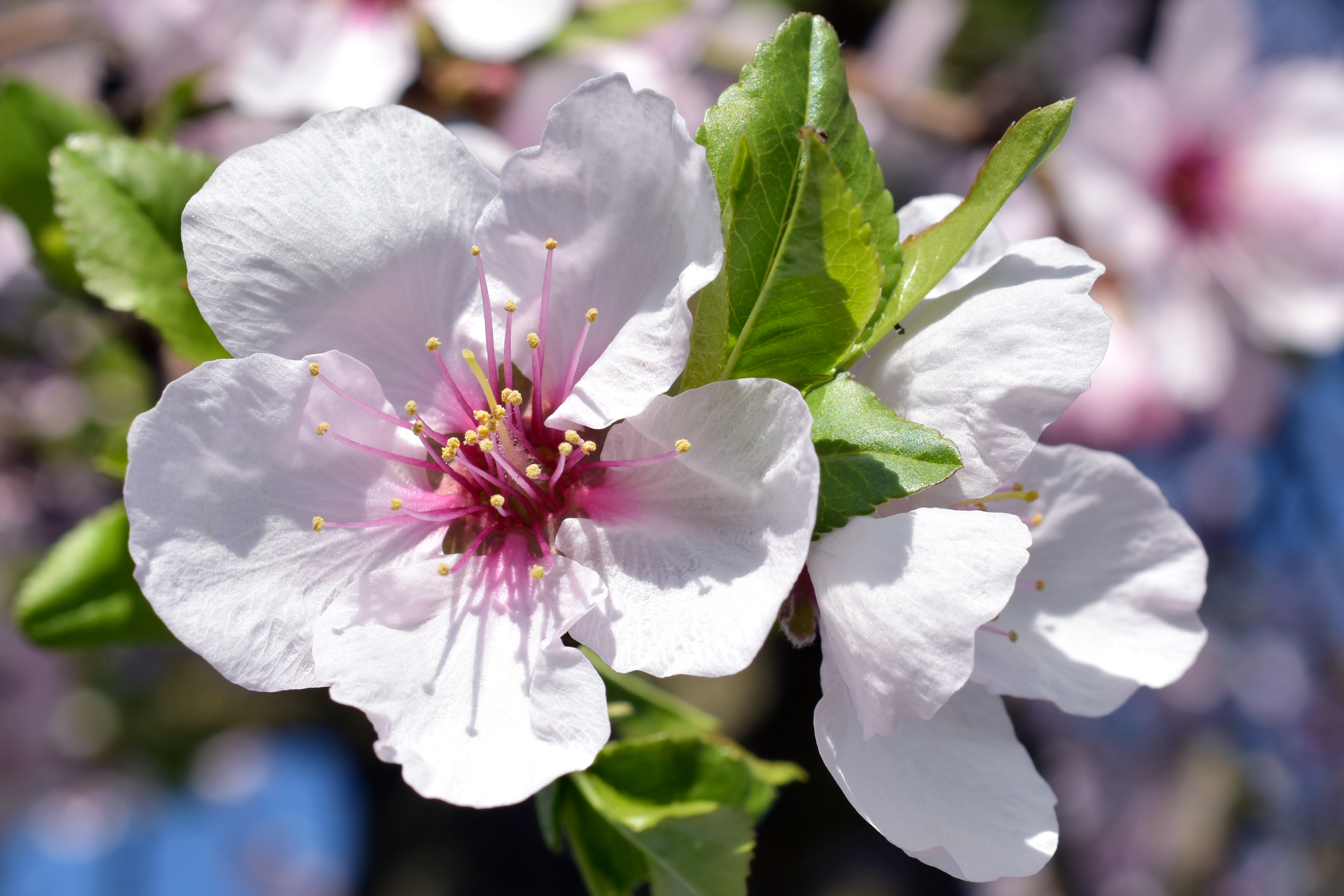 Mandelblüte (Prunus dulcis)